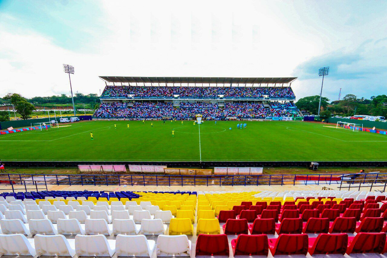 Estadio Jaraguay de Montería visto desde la tribuna Oriental